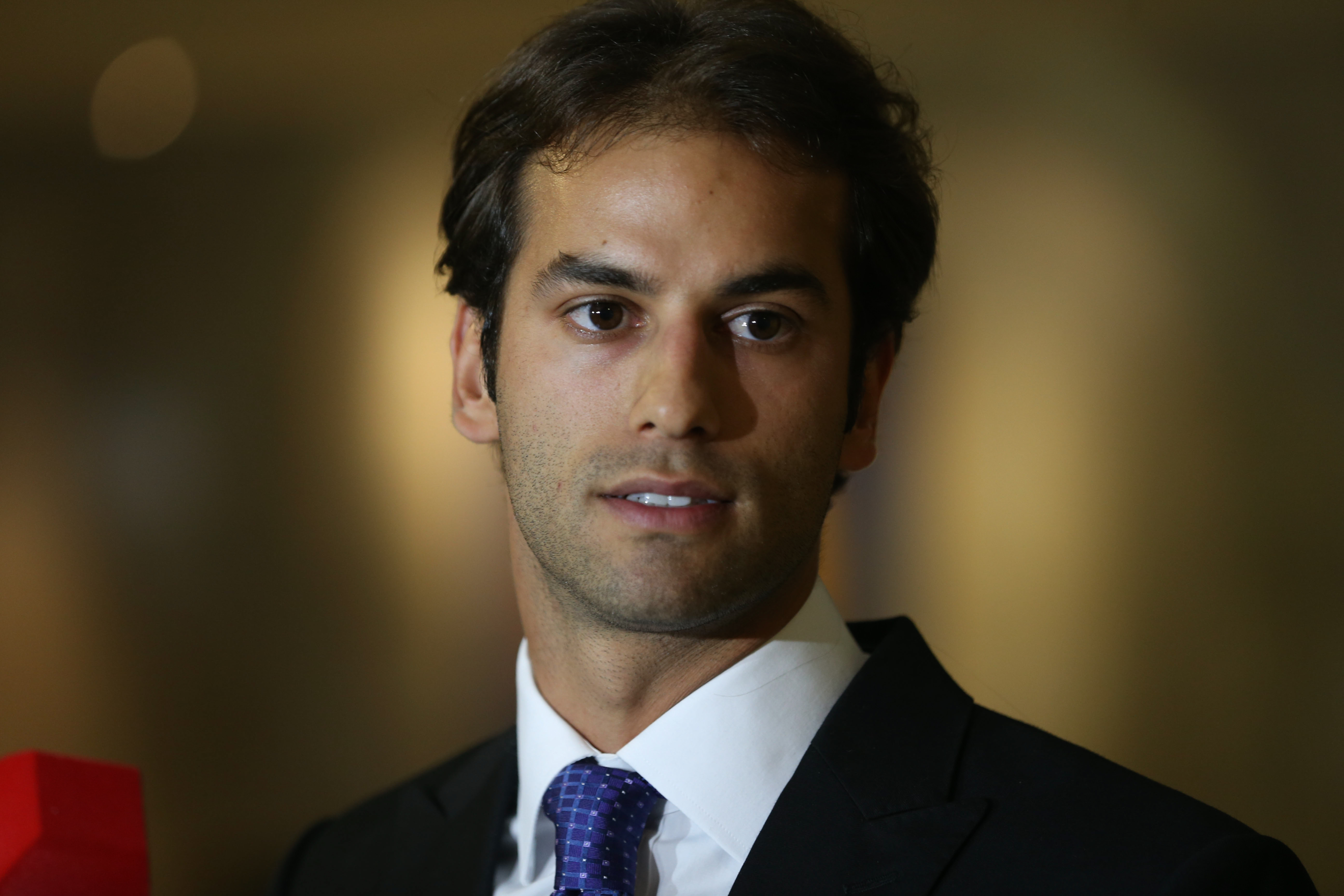 Brasília - O piloto brasileiro de Fórmula 1, Felipe Nasr, fala à imprensa após encontro com o presidente interino, Michel Temer, no Palácio do Planalto (Valter Campanato/Agência Brasil)